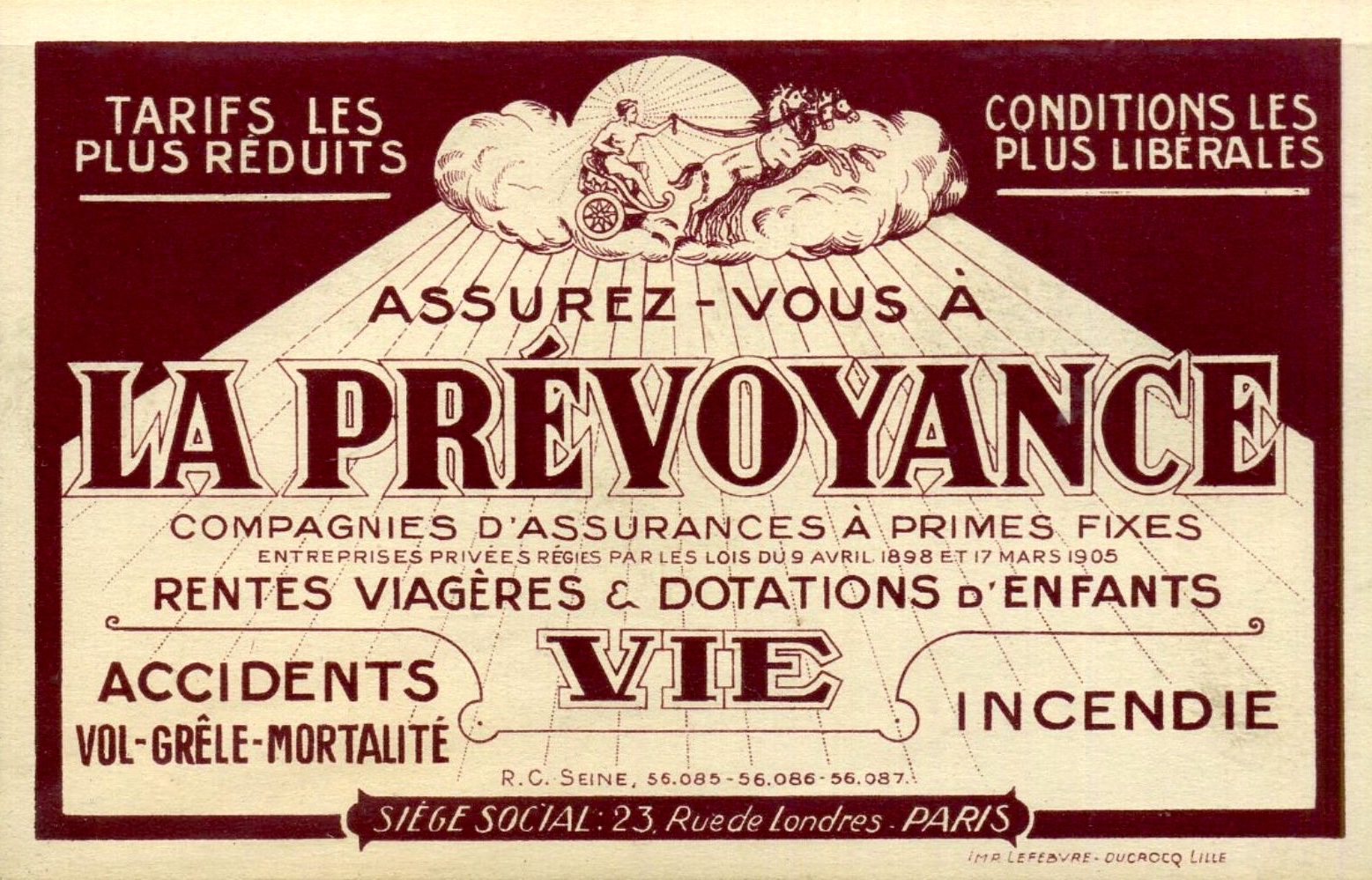 Carte postale ancienne, avant 1914. Compagnie d'assurances La Prévoyance, 23 rue de Londres à Paris 9e